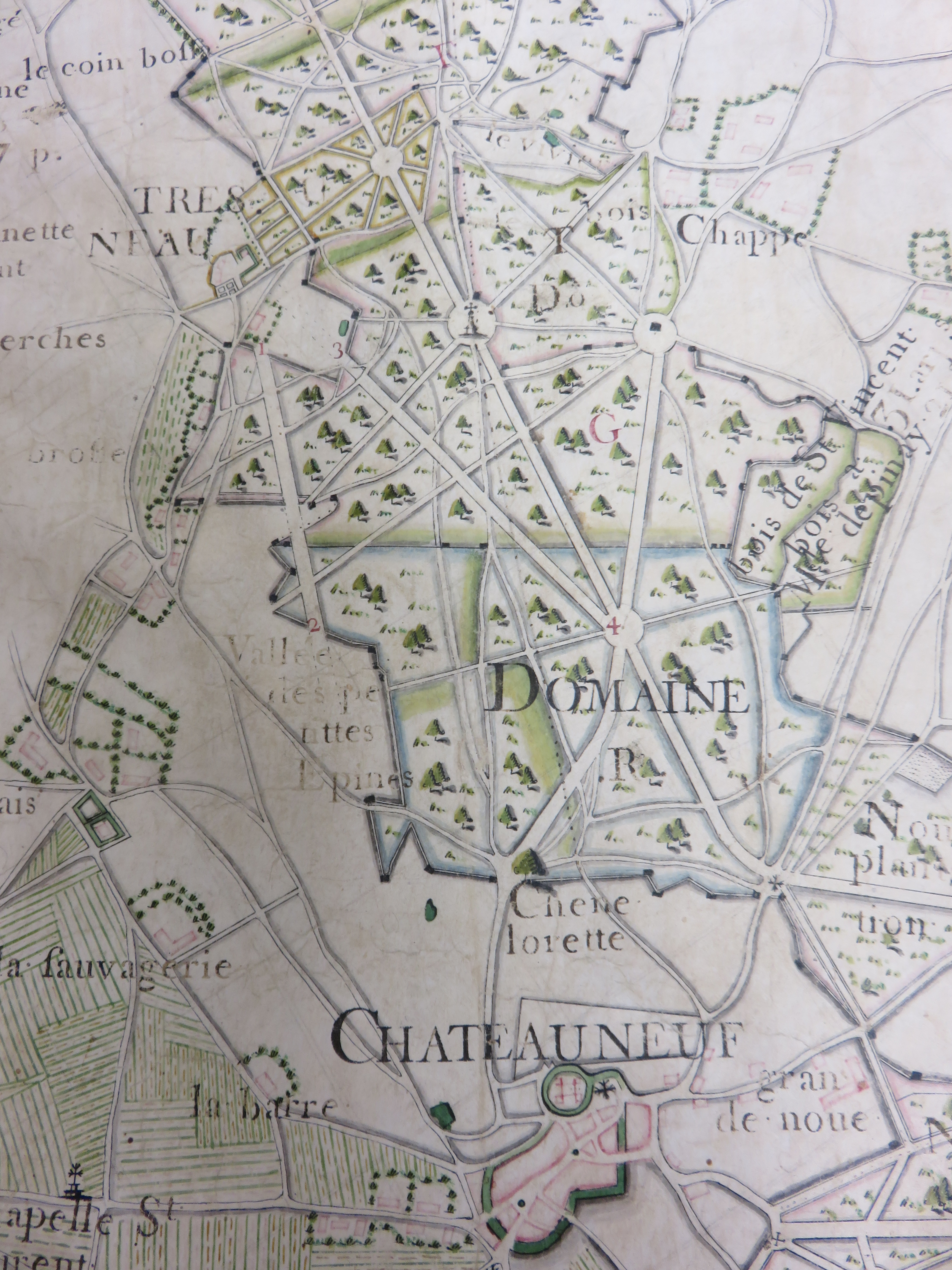 Détail d'une carte ancienne postérieure à 1761 montrant la forêt entre Châteauneuf et Tresneau (28 Eure-et-Loir)